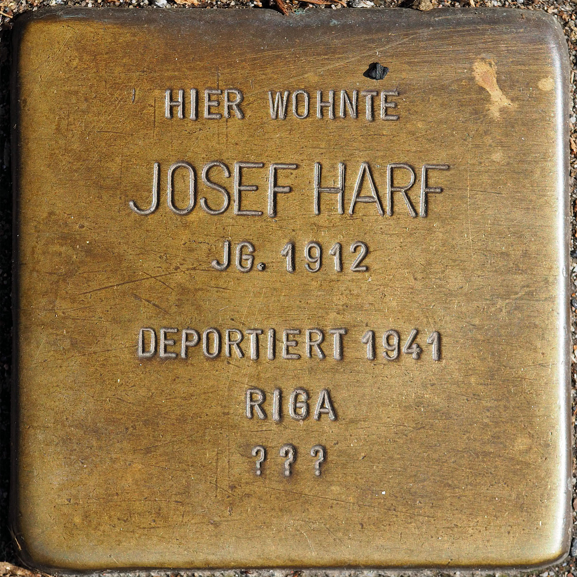 Stolpersteine MG: Harf, Josef